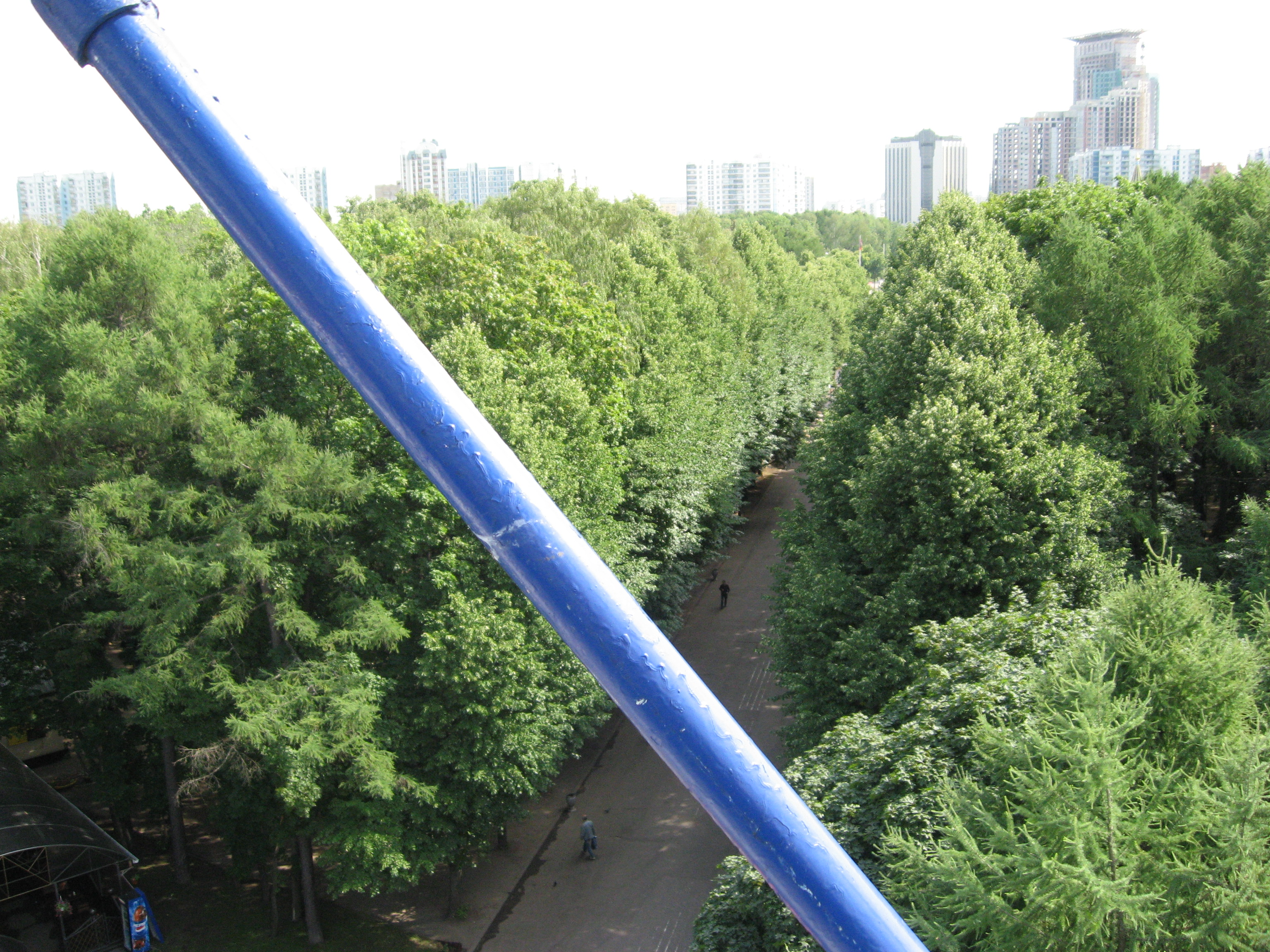 Вид на парк Сокольники с колеса обозрения